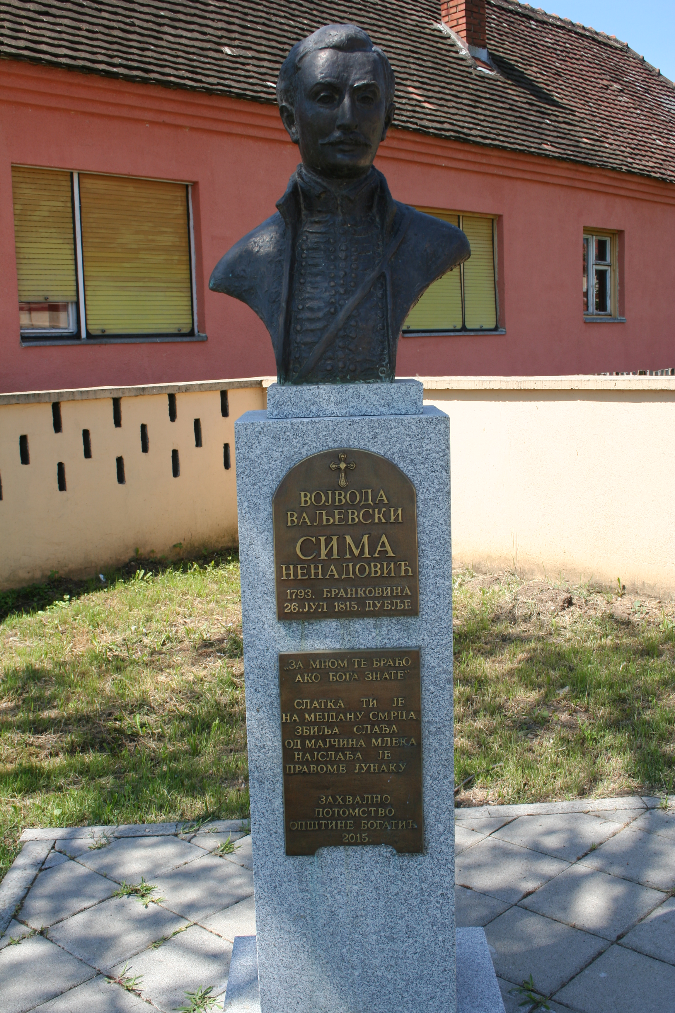 Spomenički kompleks, Dublje